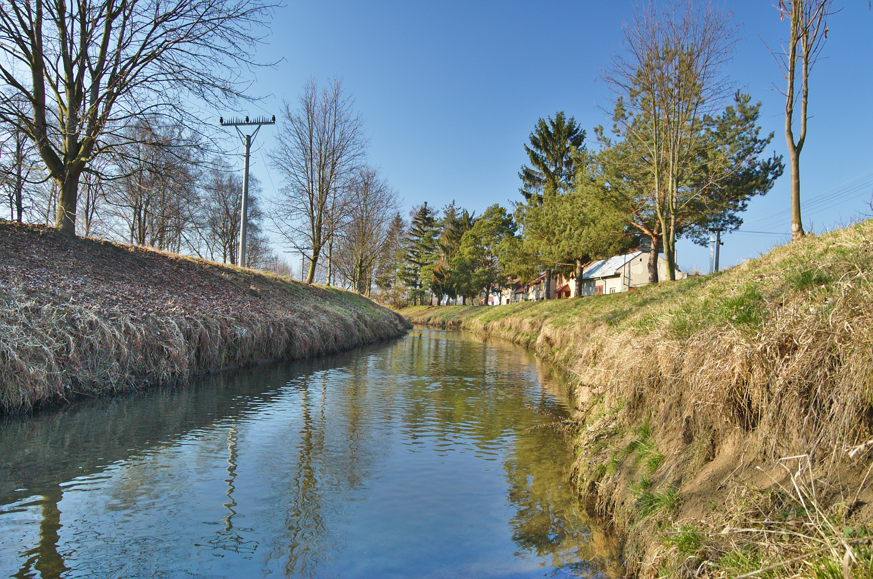 Říčka Blata, Bystročice, okres Olomouc